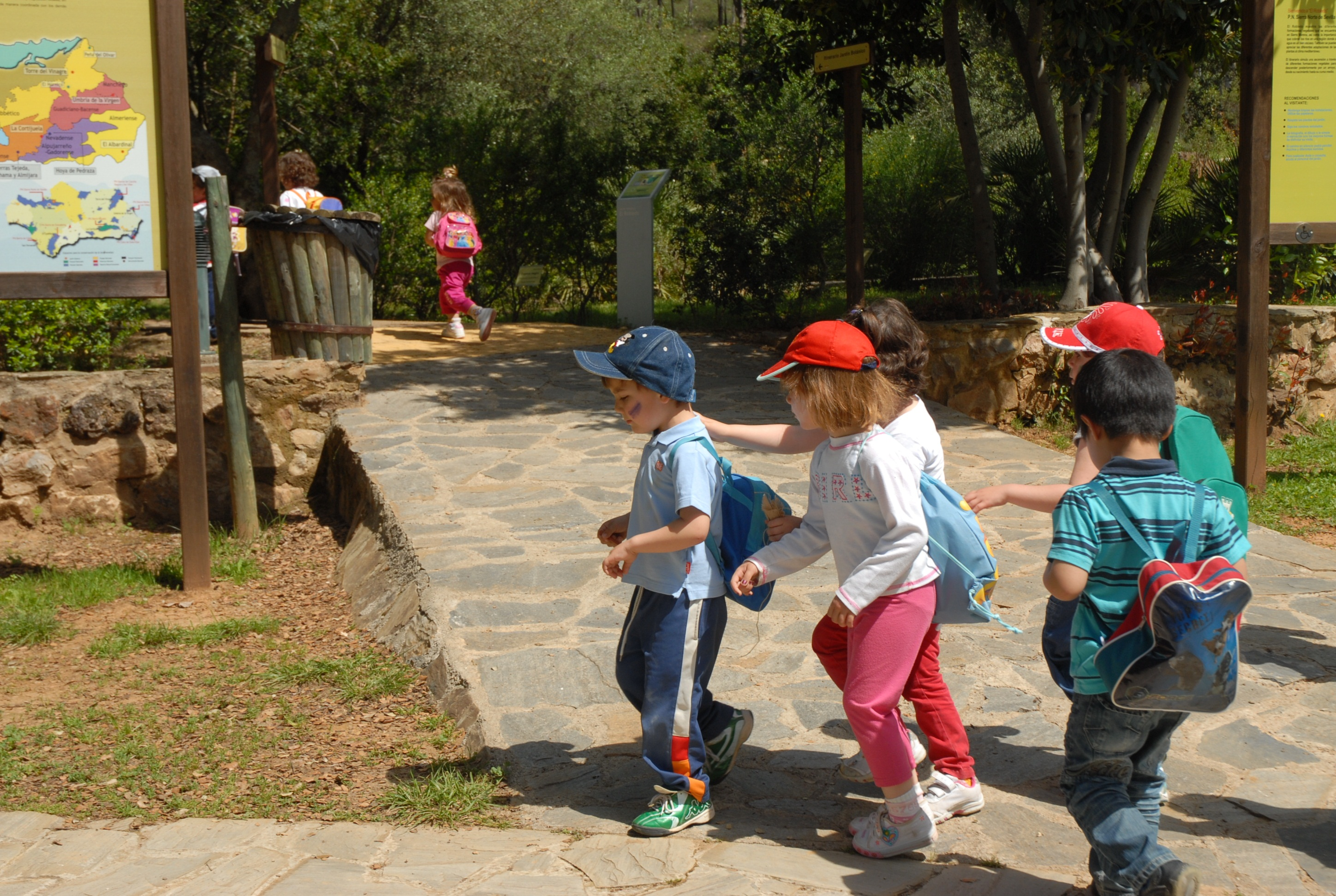 Actividades en el Jardín Botánico El Robledo